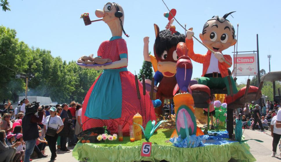 Carroza ganadora. UTU.